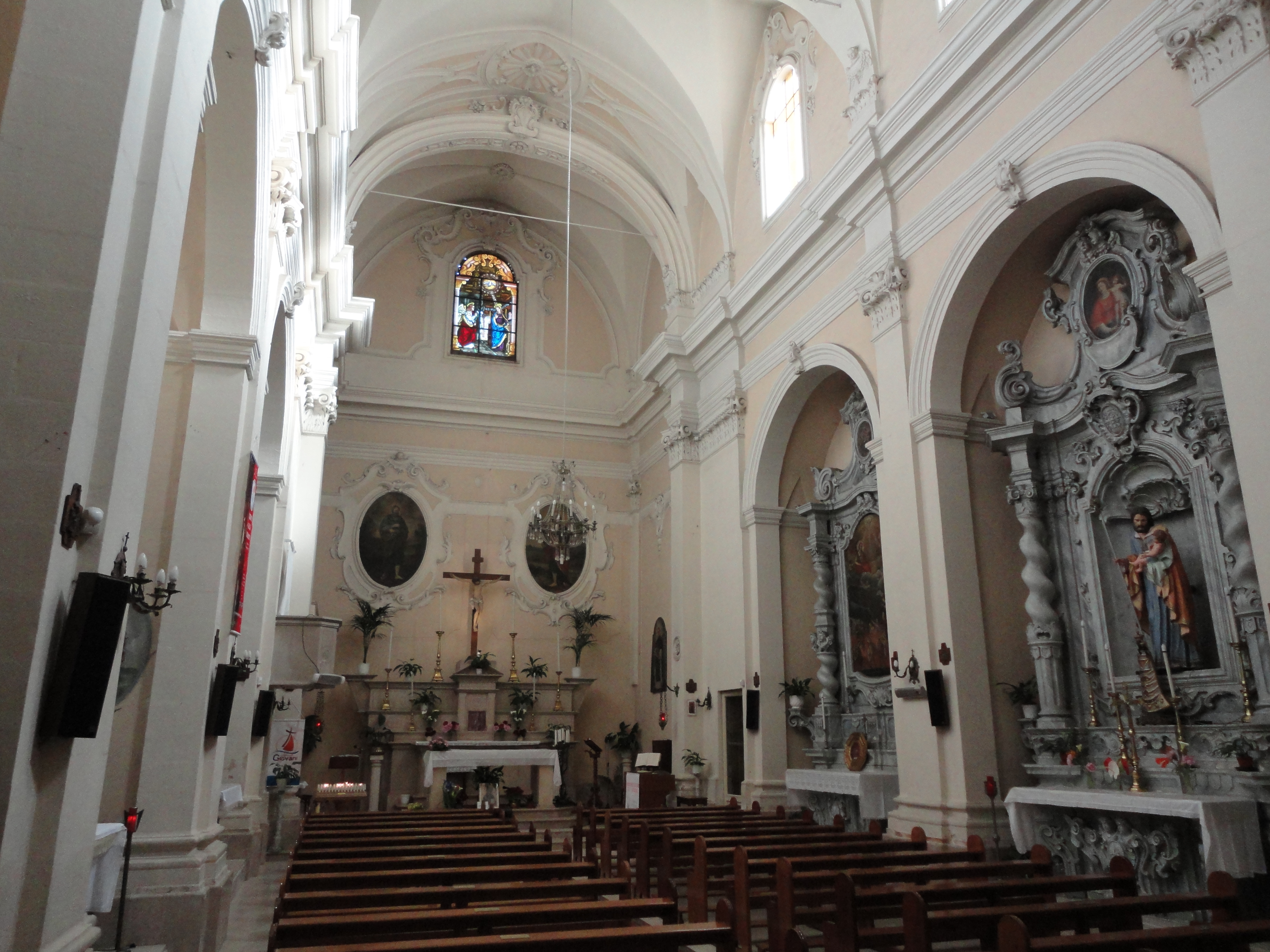 Interno chiesa madre di Palmariggi, Lecce